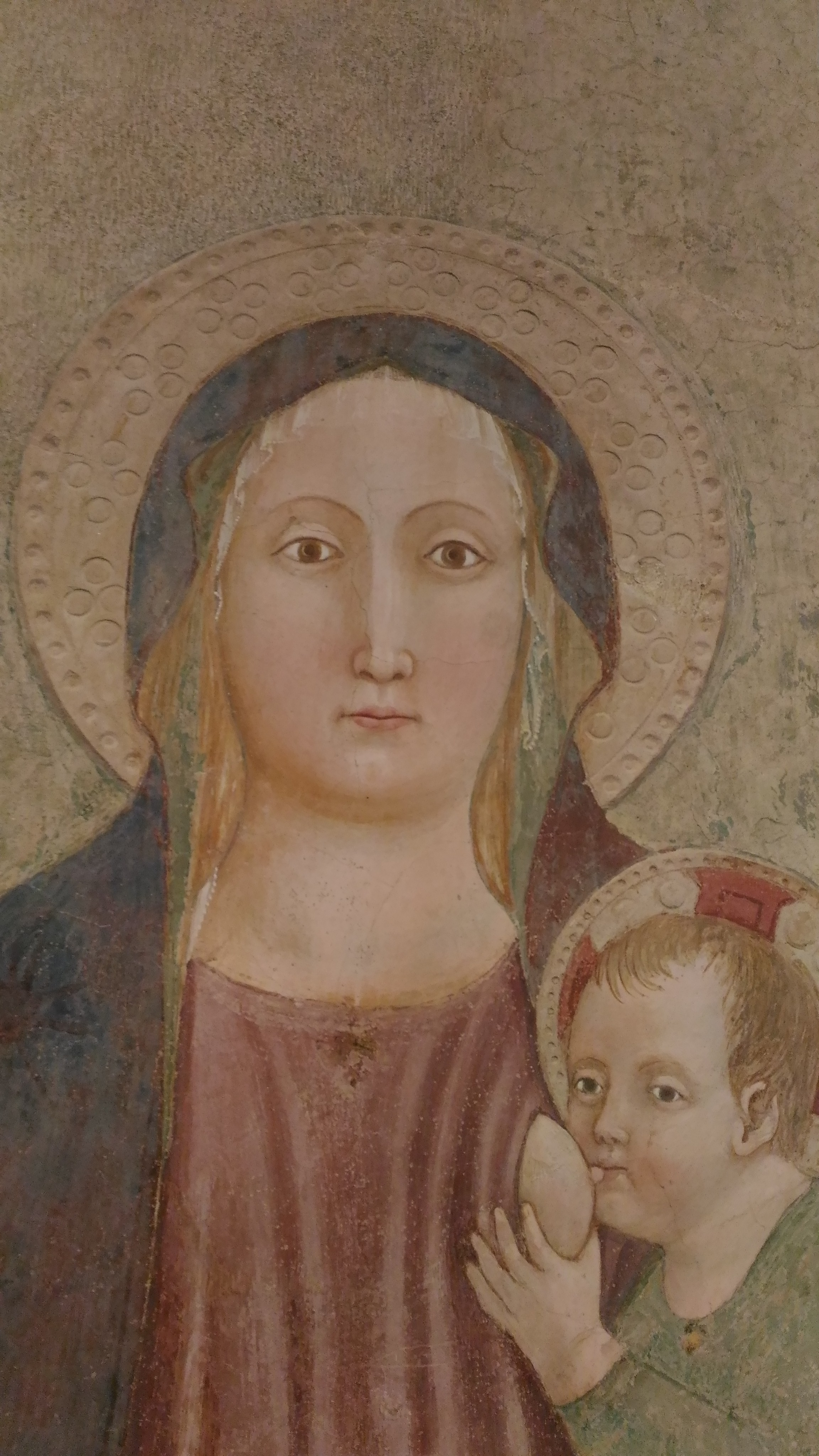 Affresco della Madonna in trono col Bambino, tra angeli e Santi, attribuita a Paolo Schiavo (particolare) - Oratorio dell'Erta Montelupo Fiorentino